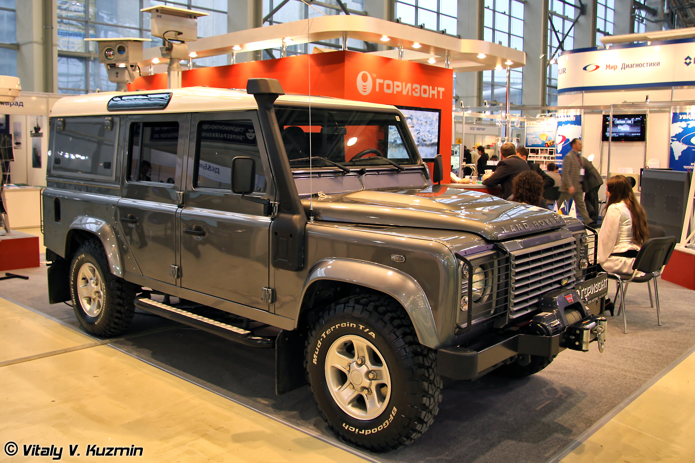 Мобильный патрульный комплекс Патриот-Окапи на базе шасси Land Rover. Комплекс контроля за наземной (надводной) обстановкой позволяет вести обнаружение и распознавание неподвижных и движущихся целей на дальностях до 15 км (Mobile patrol complex Patriot-Okapi on Land Rover base. Mobile complex of the ground (surface) situation control enables to detect and recognize the fixed and movable targets on the ranges up to 15 km)